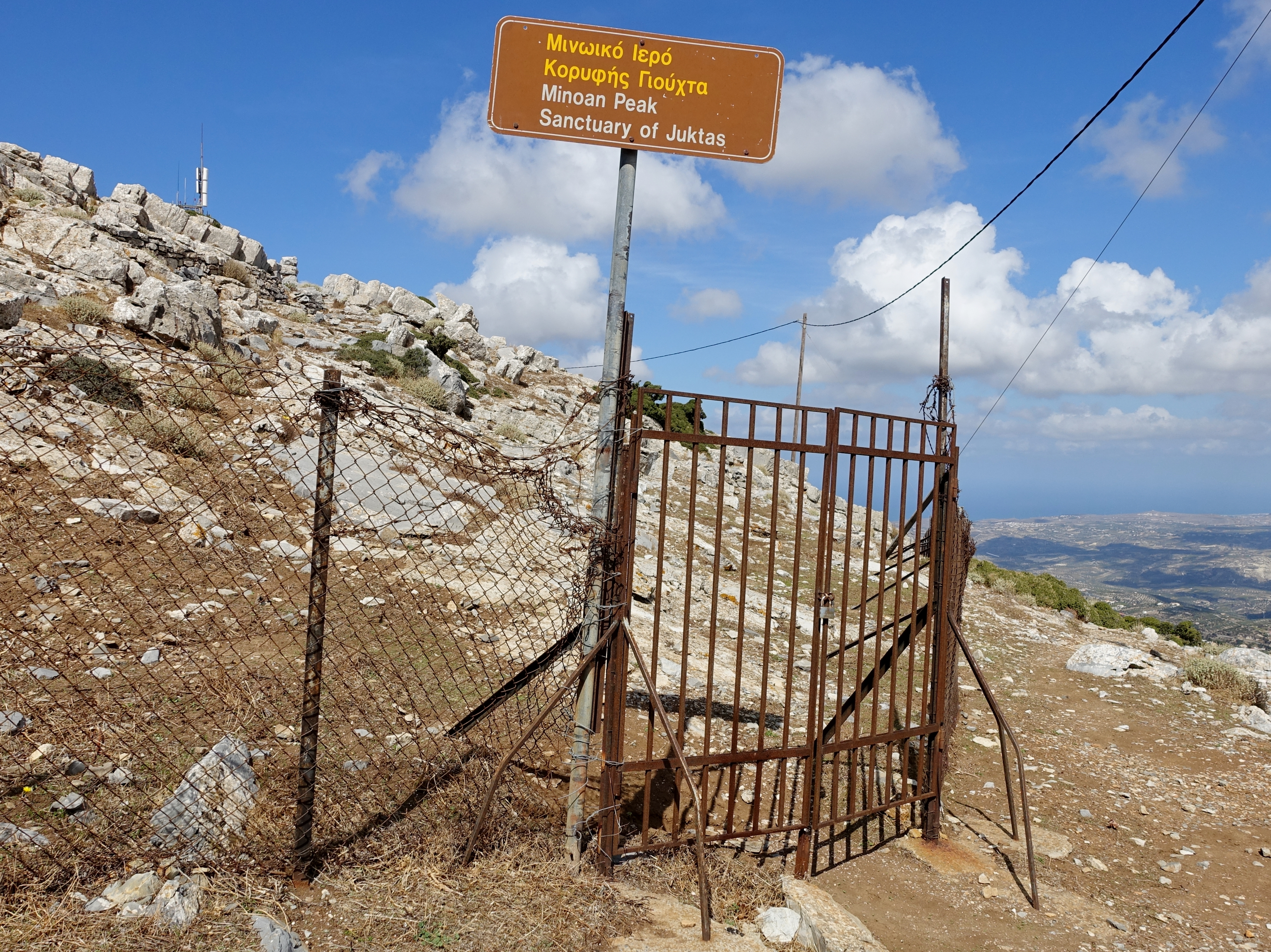 Hinweisschild zum minoischen Gipfelheiligtum auf dem Giouchtas (Γιούχτας), Kreta, Griechenland